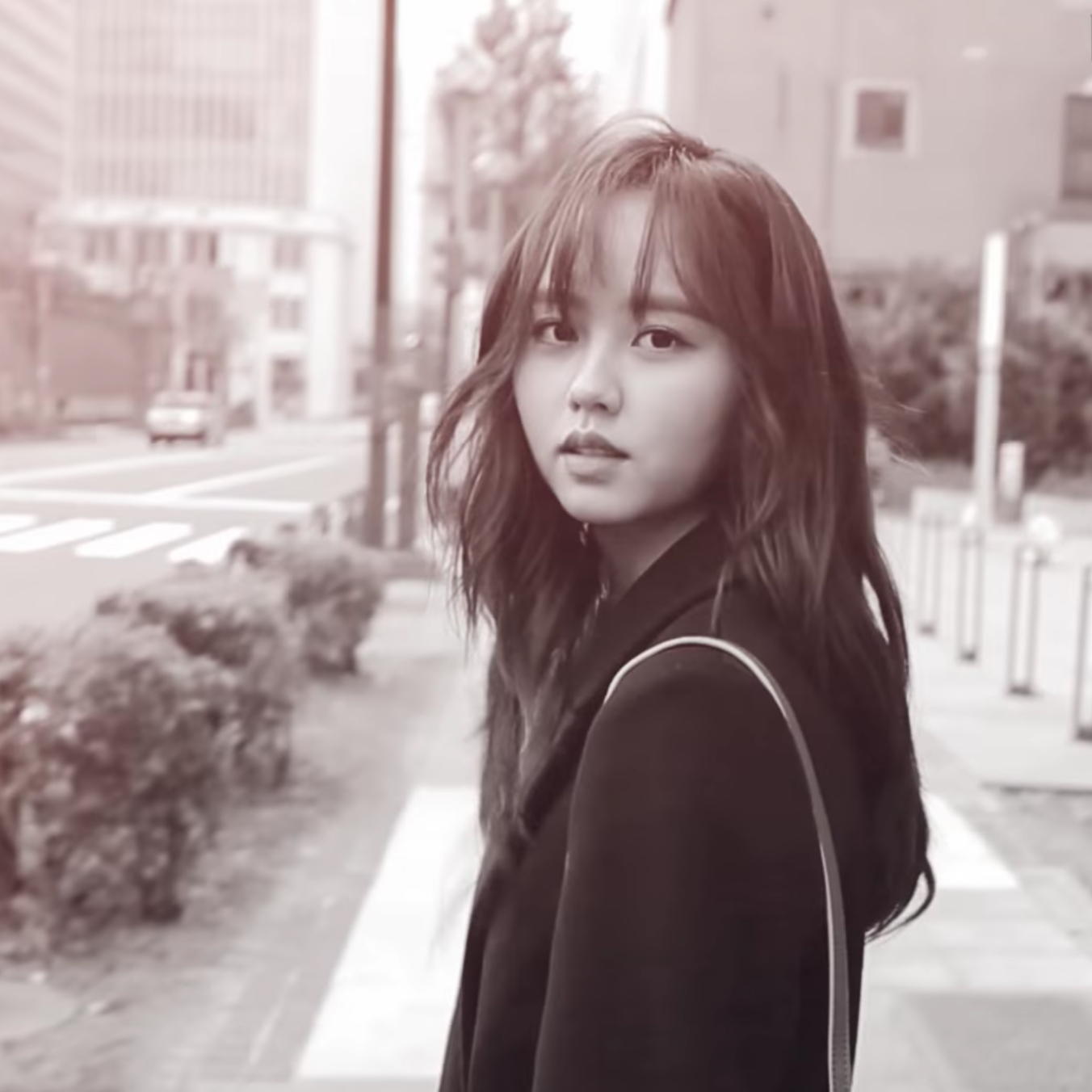 오스카 와일드는 ‘스무 살이라는 것은 아주 놀라운 재능이다’라고 말했다. 배우 김소현이 스무 살이 됐다.